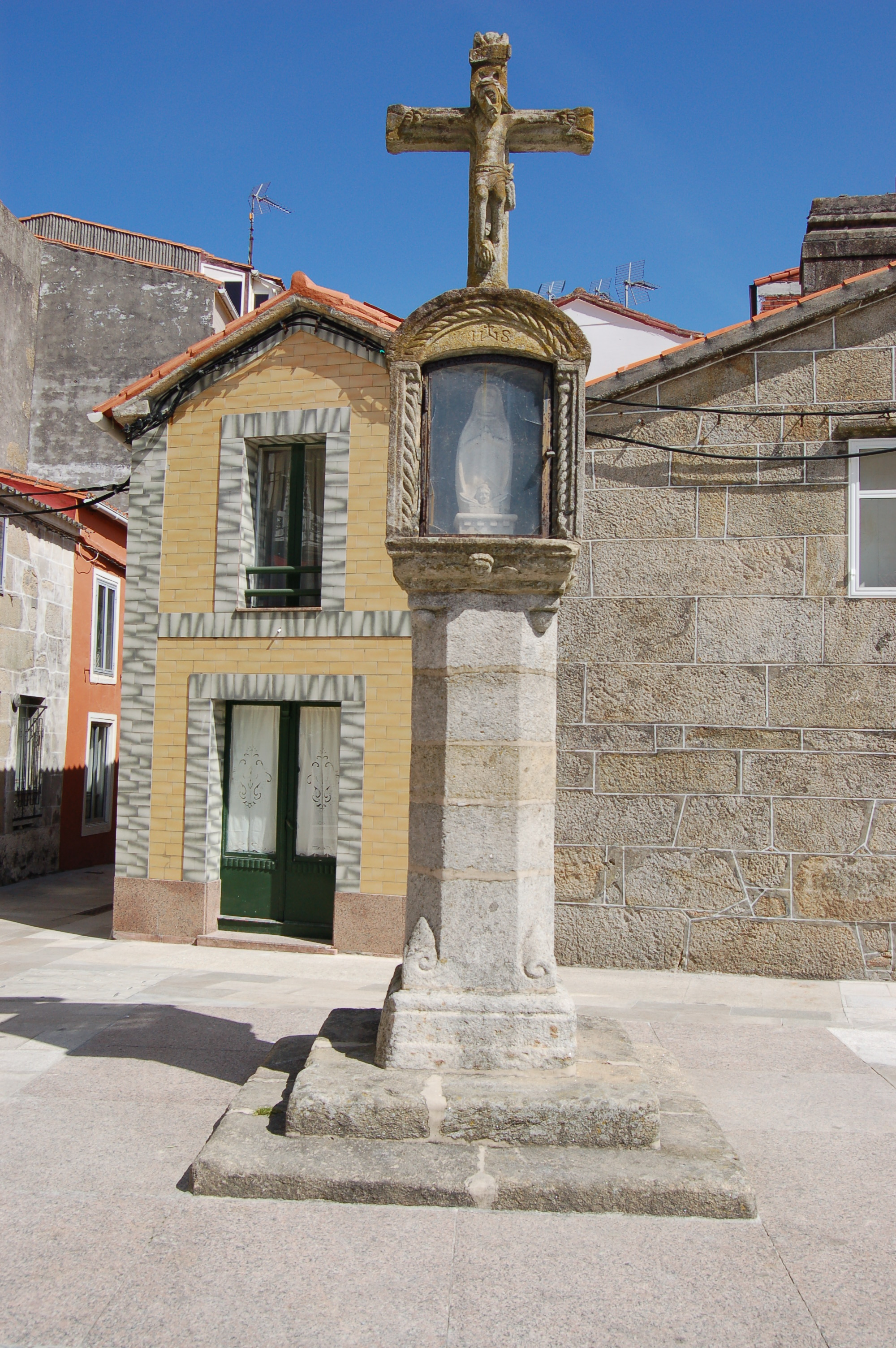 Cruceiro de capela na praza de España en Noal (Porto do Son).